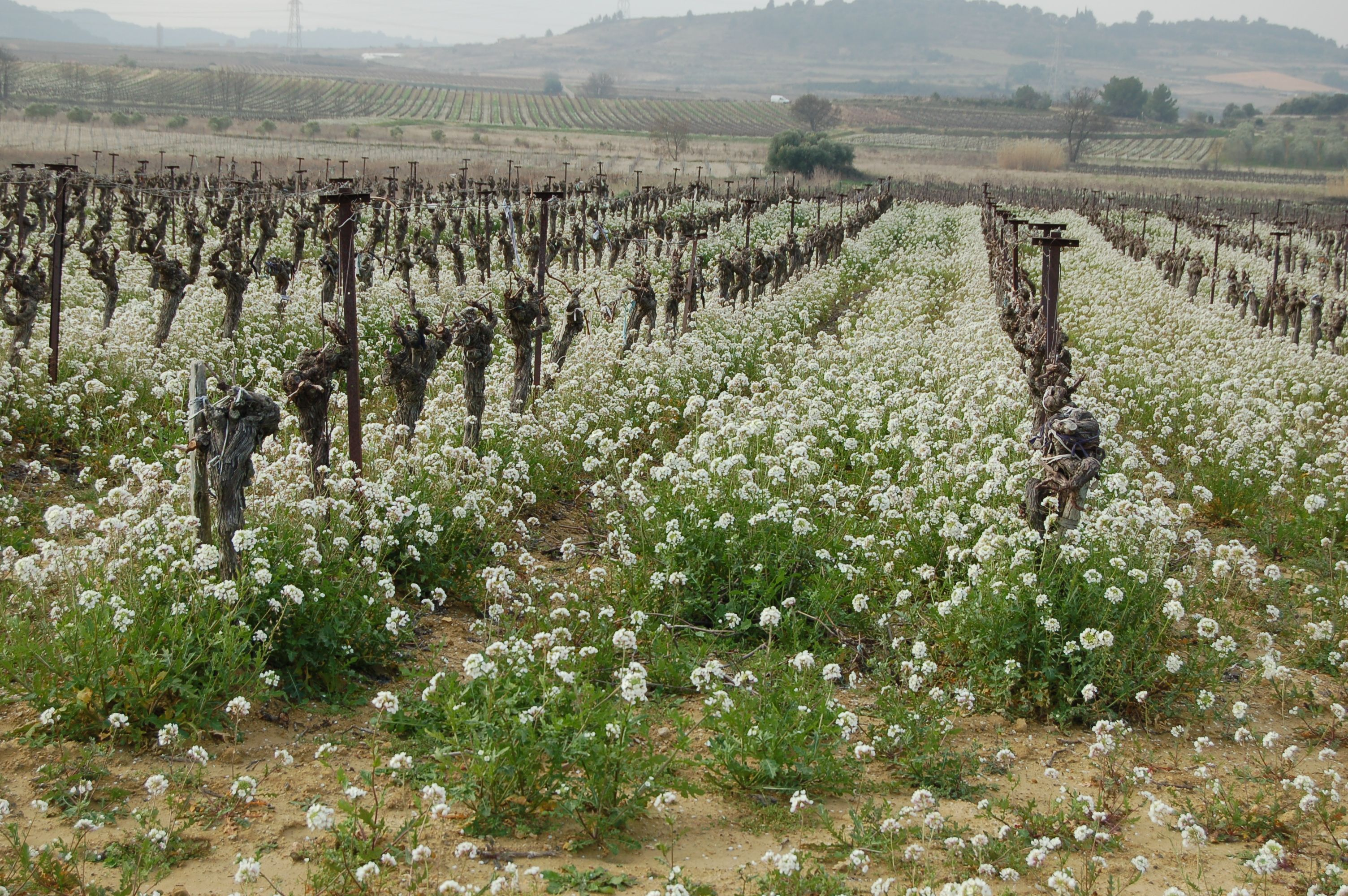 Vigne blanche avec Diplotaxis erucoides (Vendémian, Hérault)